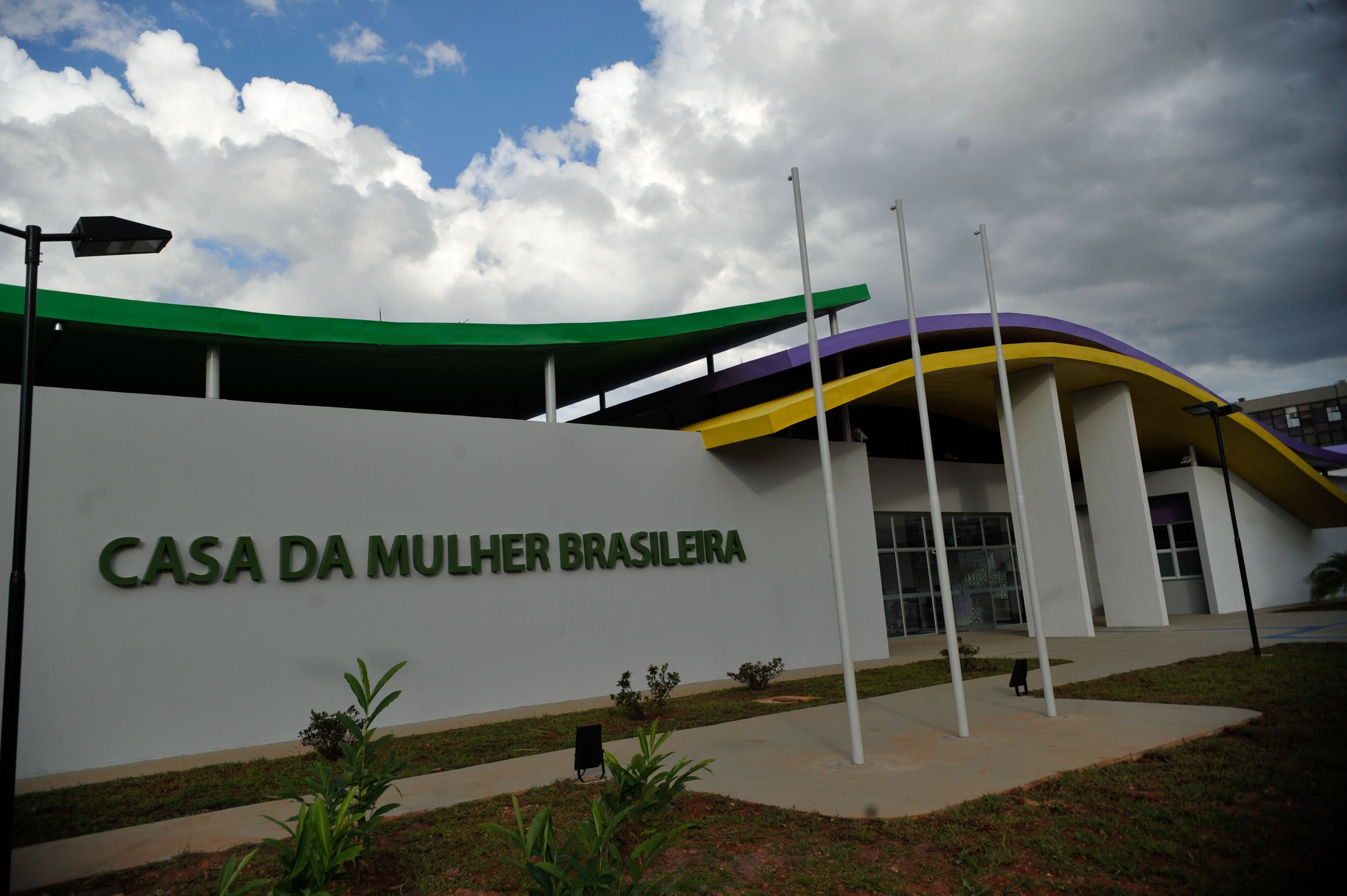 Casa da Mulher Brasileira, em Brasília (Fabio Rodrigues Pozzebom /Agência Brasil)